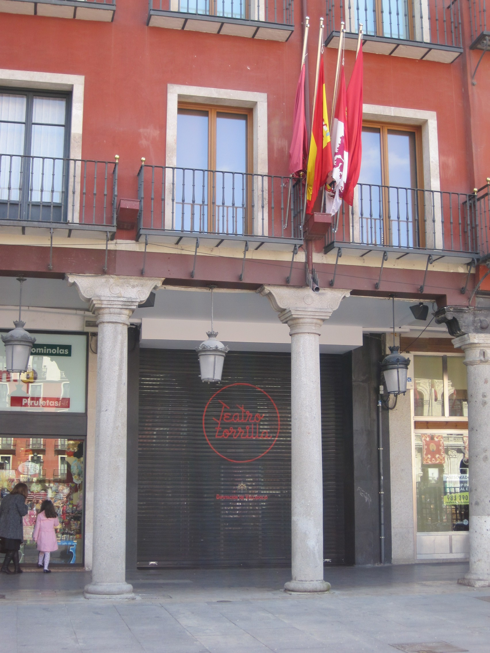 Entrada al teatro Zorrilla, en la plaza Mayor de Valladolid (España).